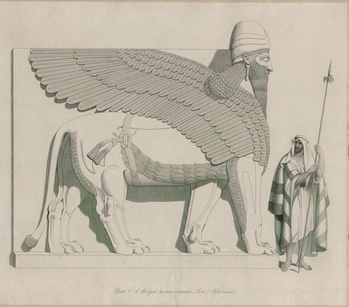 Der geflügelte Löwe von Nimrud - ausgegraben von Layard